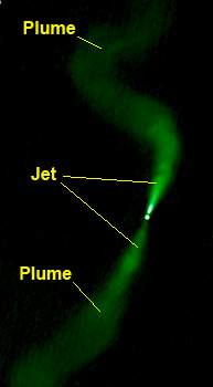 Plumes et jet étiquetés de la radiogalaxie 3C 31